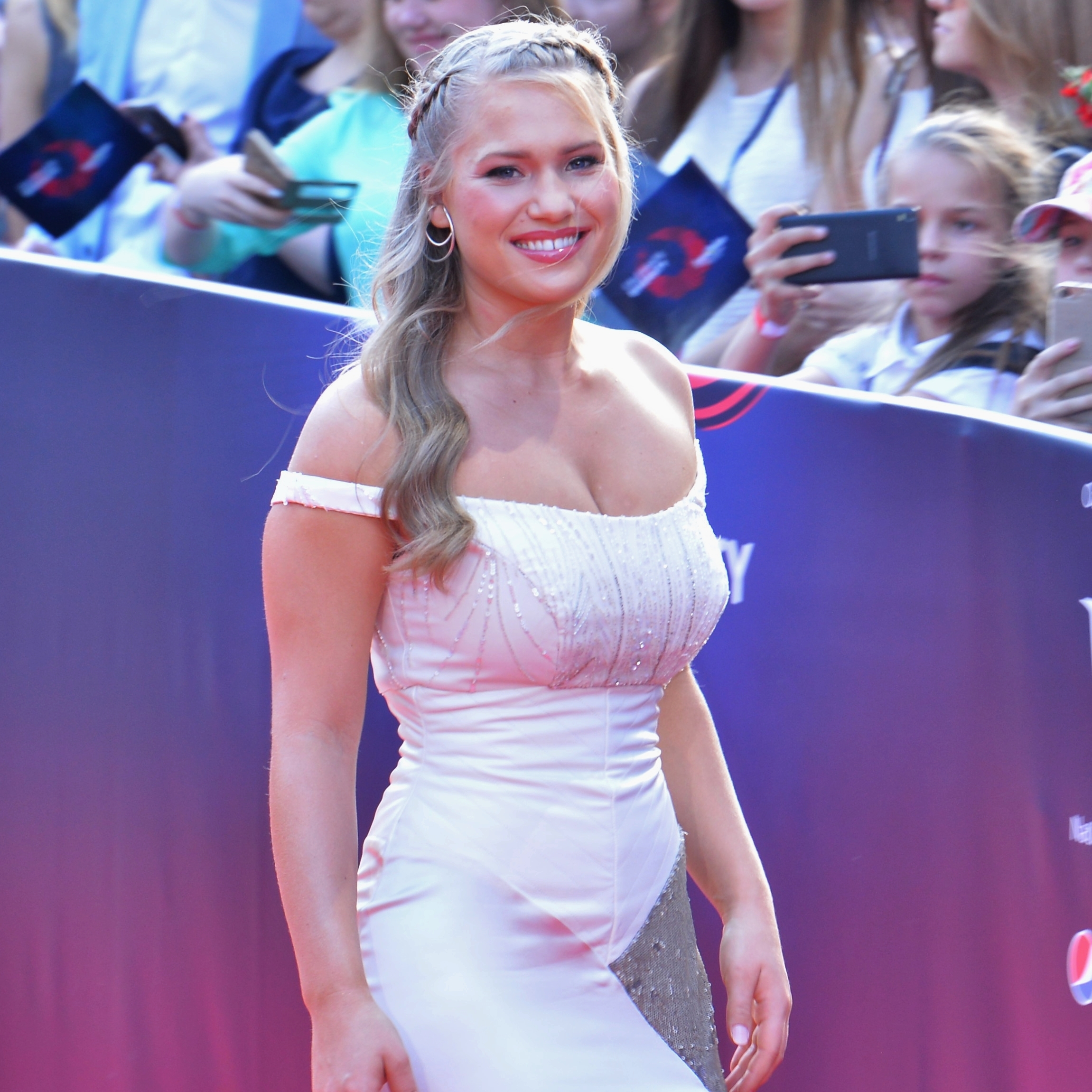 Співачка з Данії Аня Ніссен на церемонії відкриття Євробачення 2017 у Києві